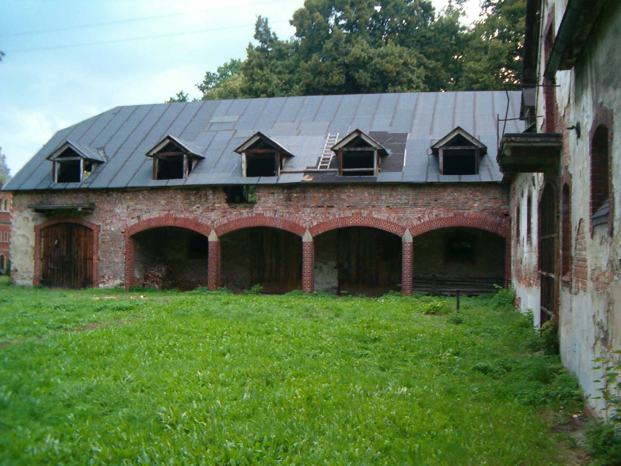 Wozownia. Pałac w Krowiarkach.